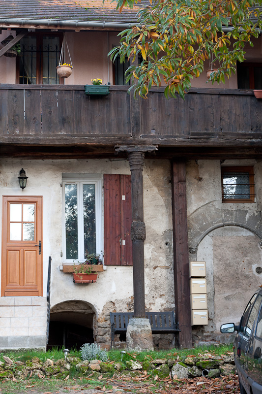 Morsang-sur-Orge - Pilier sculpté de la ferme de l'abbaye.